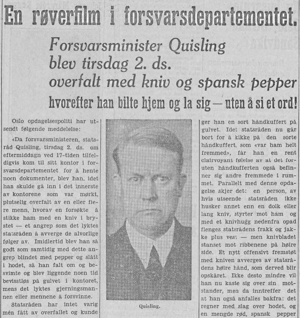 Arbeiderbladets omtale av «Pepperoverfallet» mot Vidkun Quisling.